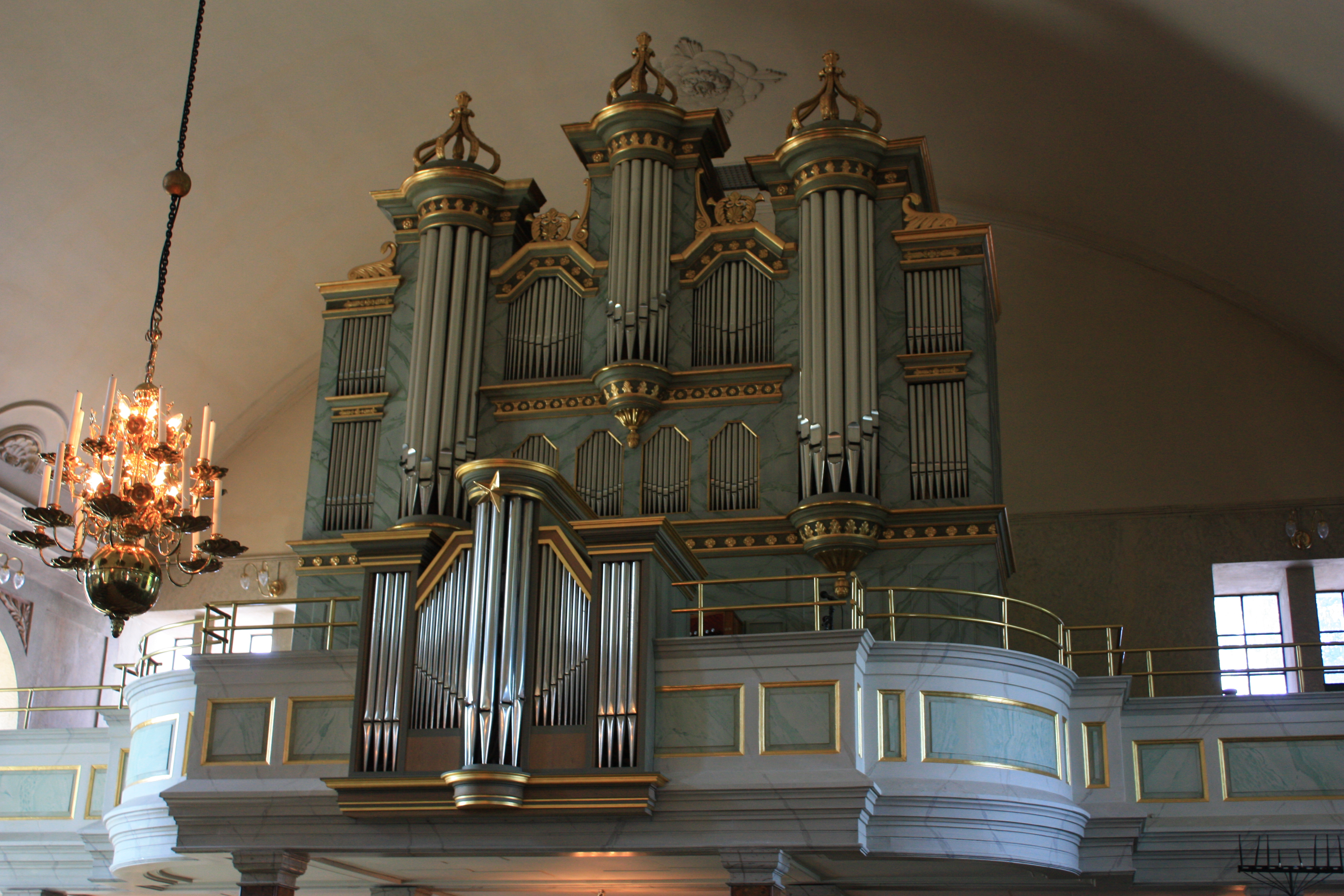 Läktarorgeln i Eksjö kyrka